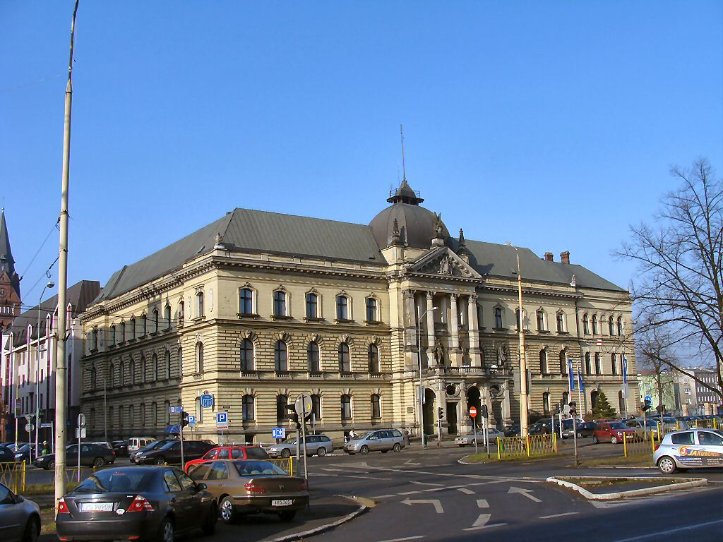 Pałac Ziemstwa Pomorskiego w Szczecinie (al. Niepodległości 40)